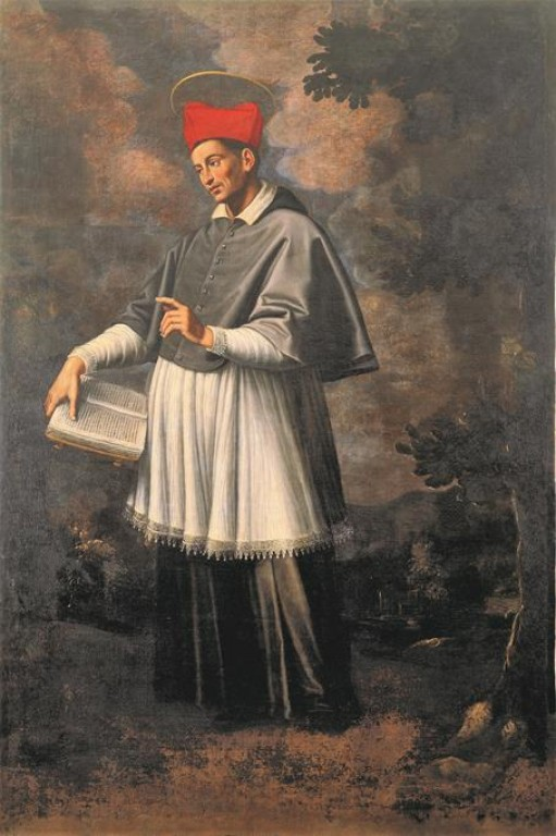 San Buenaventura, óleo sobre lienzo, Valladolid, Monasterio de las Descalzas Reales